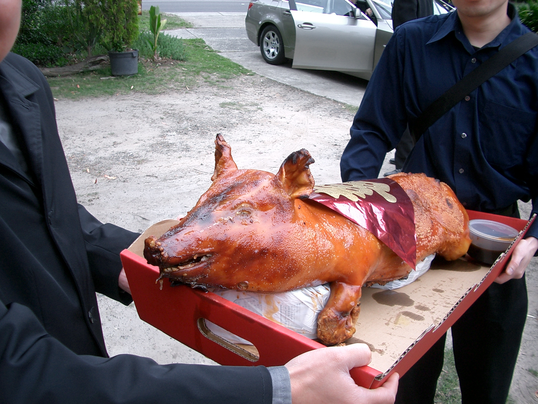 Roast Suckling Pig